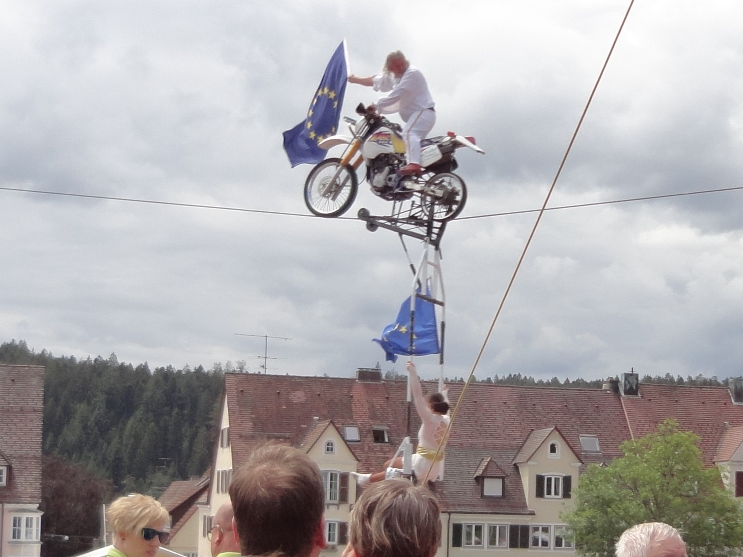 Falko Traber mit Motorrad auf dem Hochseil, Hochseilshow auf dem Marktplatz in Freudenstadt. Das Seil war gespannt von einem Gerüst in der Mitte des Marktplatzes bis zum Turm der evangelischen Stadtkirche.